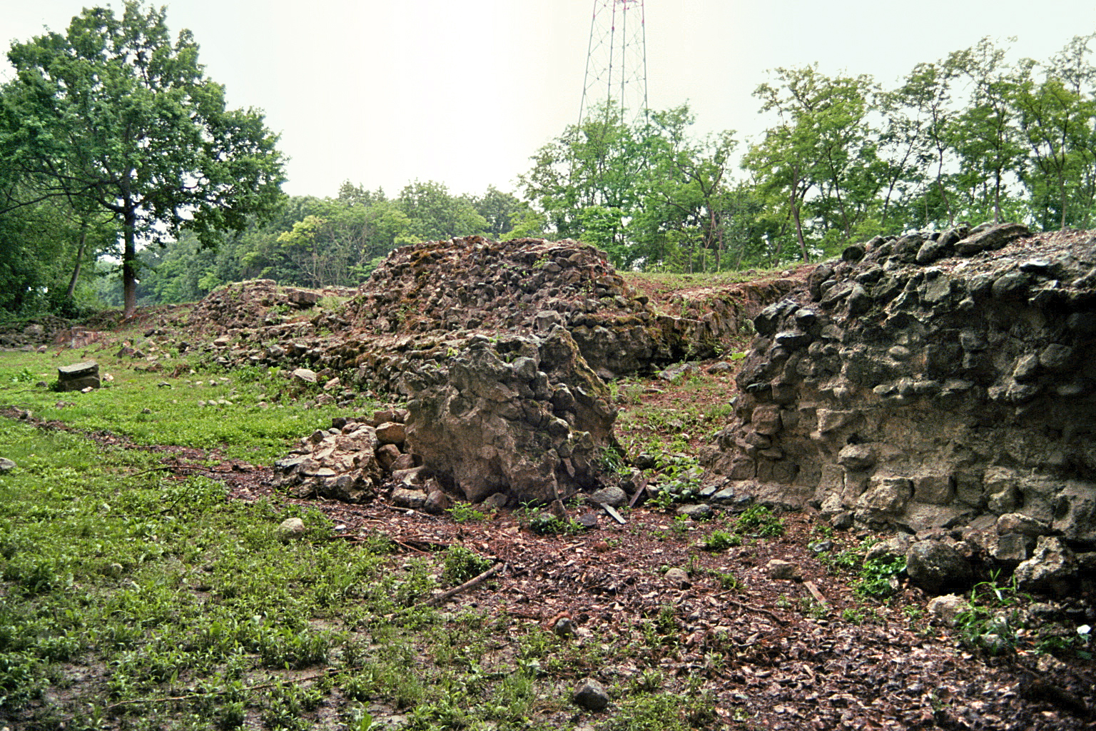 Die donauseitige Front des Burgus Szigetmonostor-Horány (Ungarn). Die Aufnahme wurde im strömenden Regen gemacht.